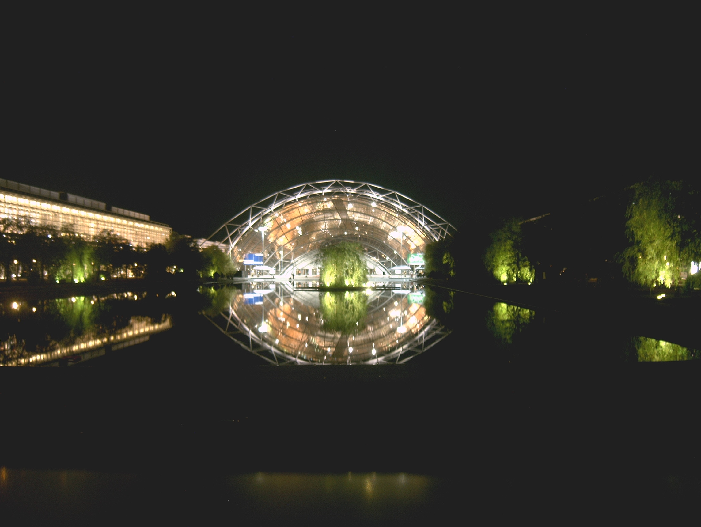 Leipzig Trade Fair at night